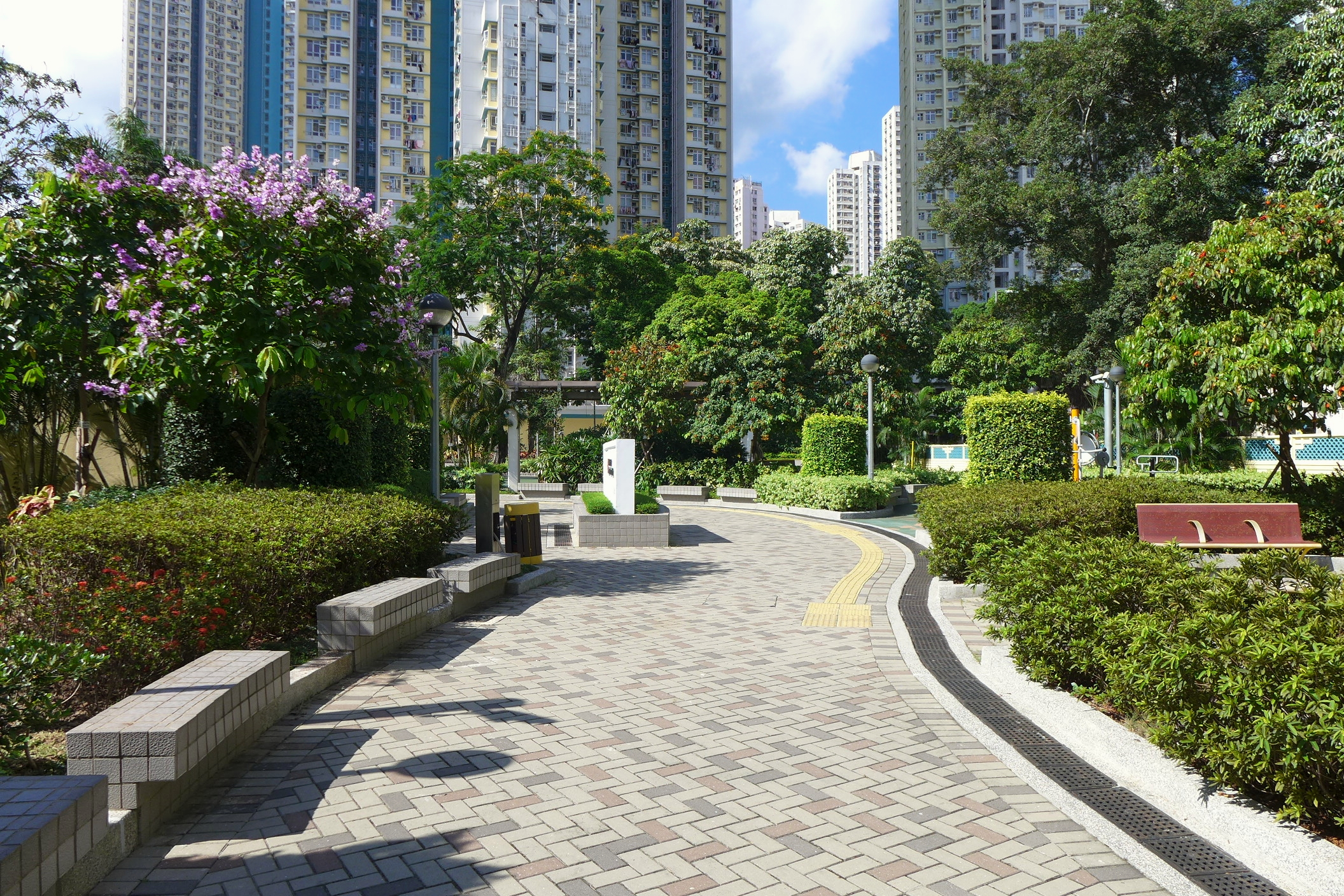 Lower Ngau Tau Kok Estate